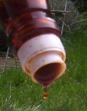 Stroop uit een fles